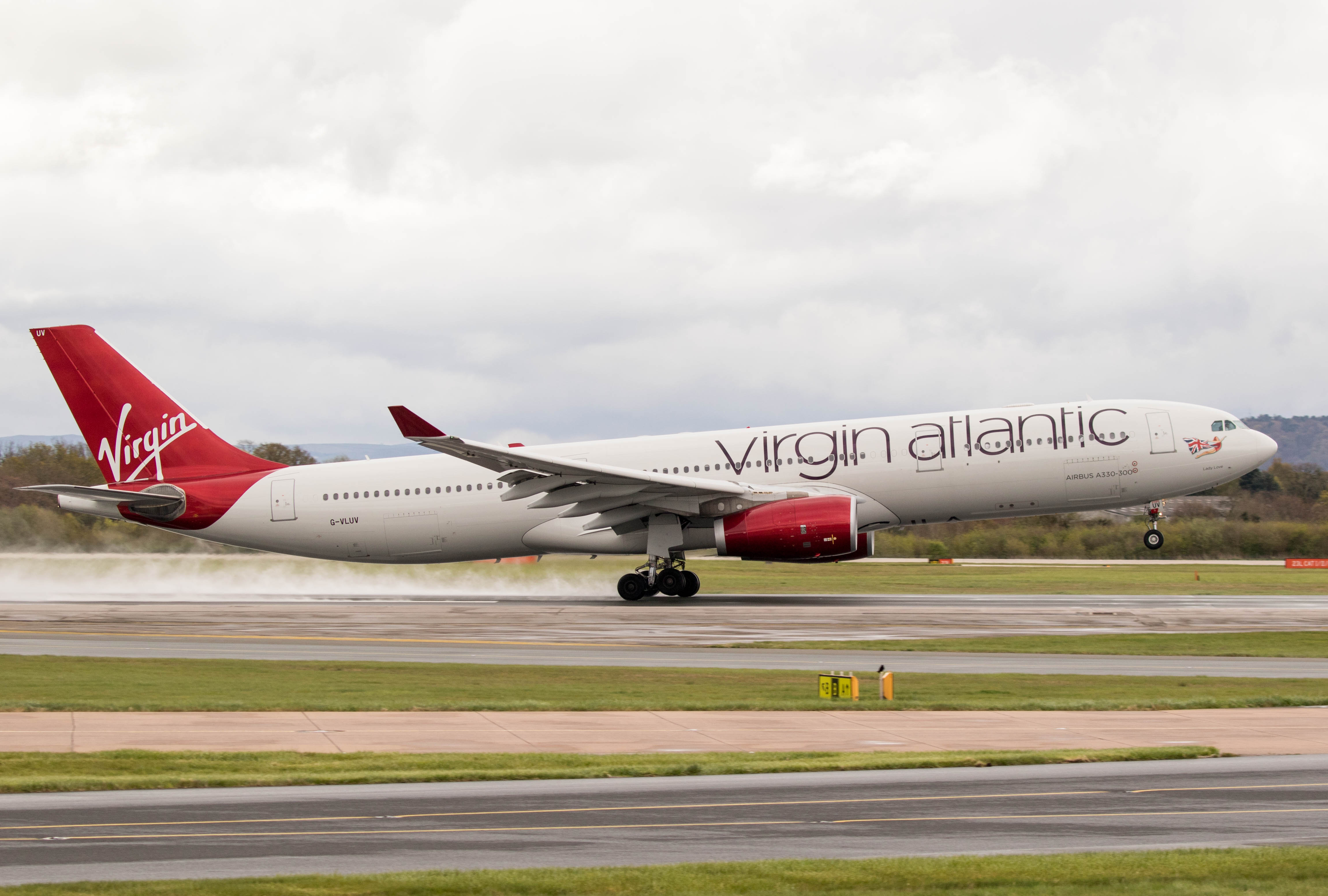 G-VLUV